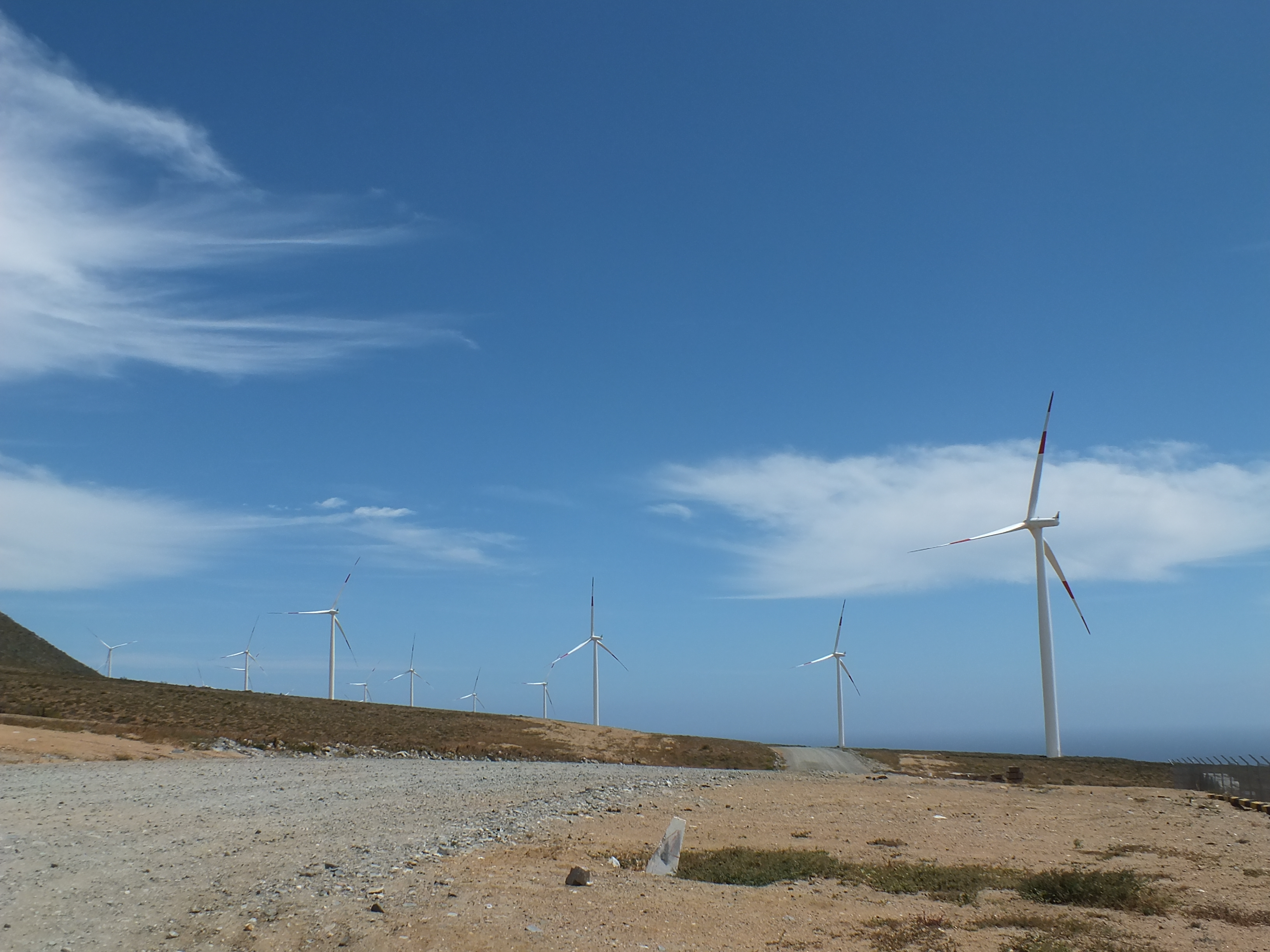 Parque Eolico El Arrayan ubicado en los faldeos costeros de la cordillera de Talinay.